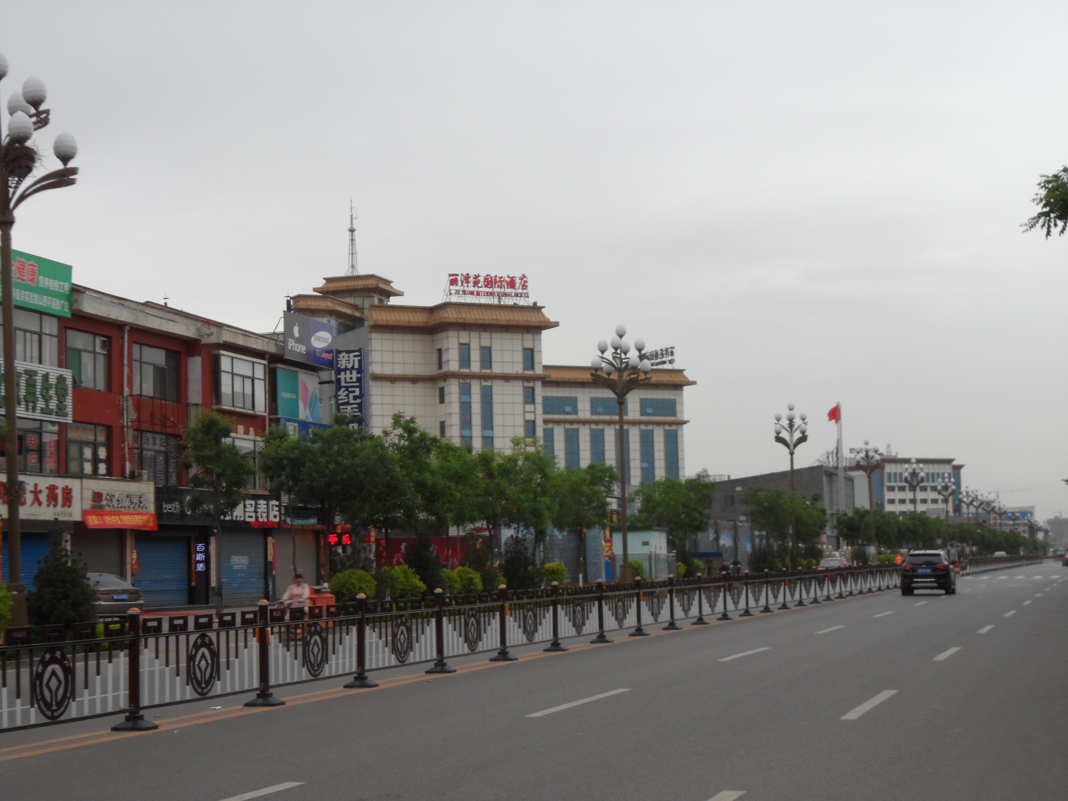 山西平遥县